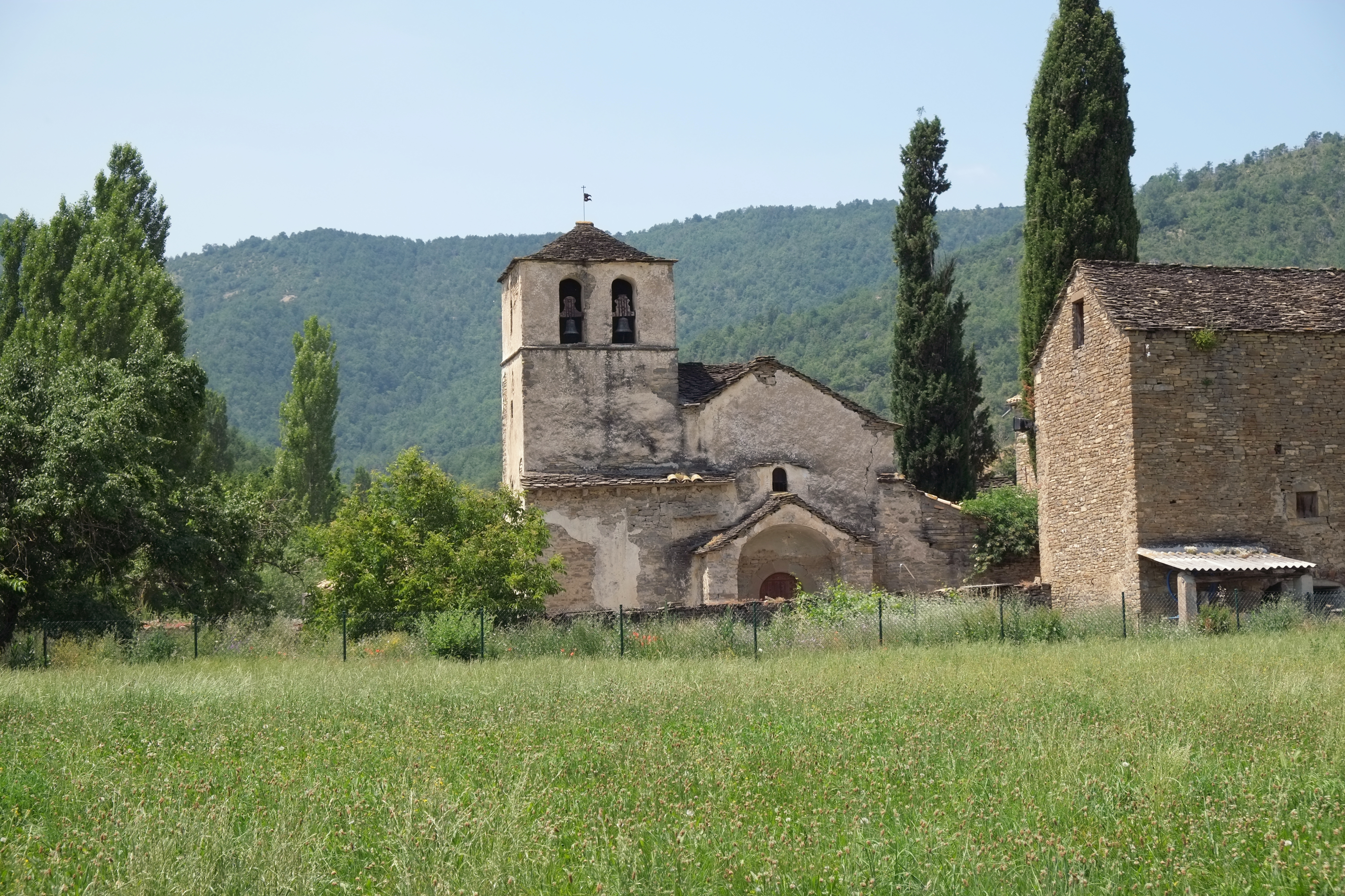 Kirche in Lastiesas Bajas in der Provinz Huesca in Aragonien (Spanien)